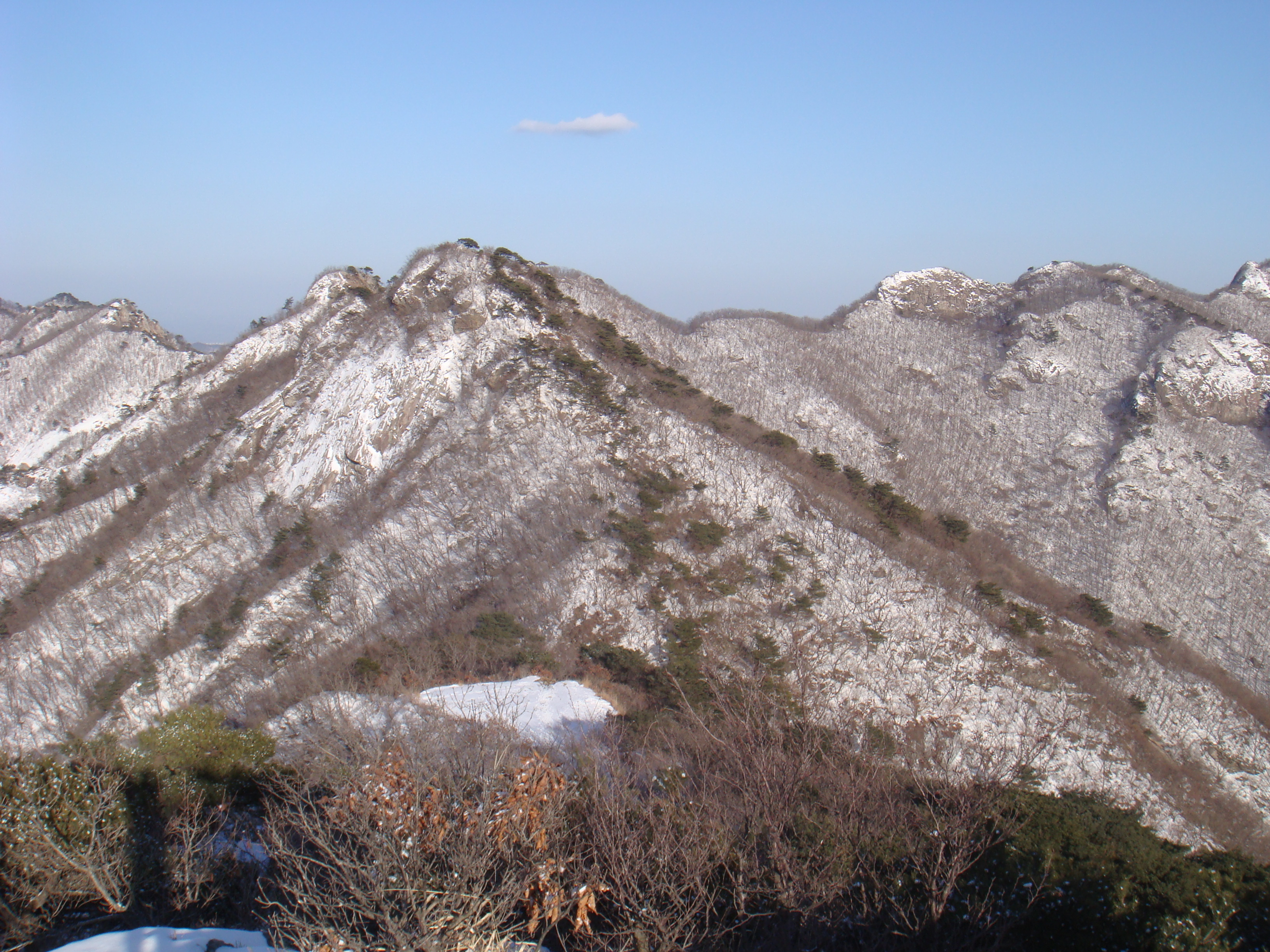 Gunung Gyeryong di musim dingin.